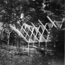 Bundesgartenschau 1957 in Köln - Gatter als Gegenbeispiel